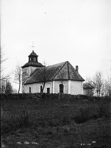 Bäcks kyrka